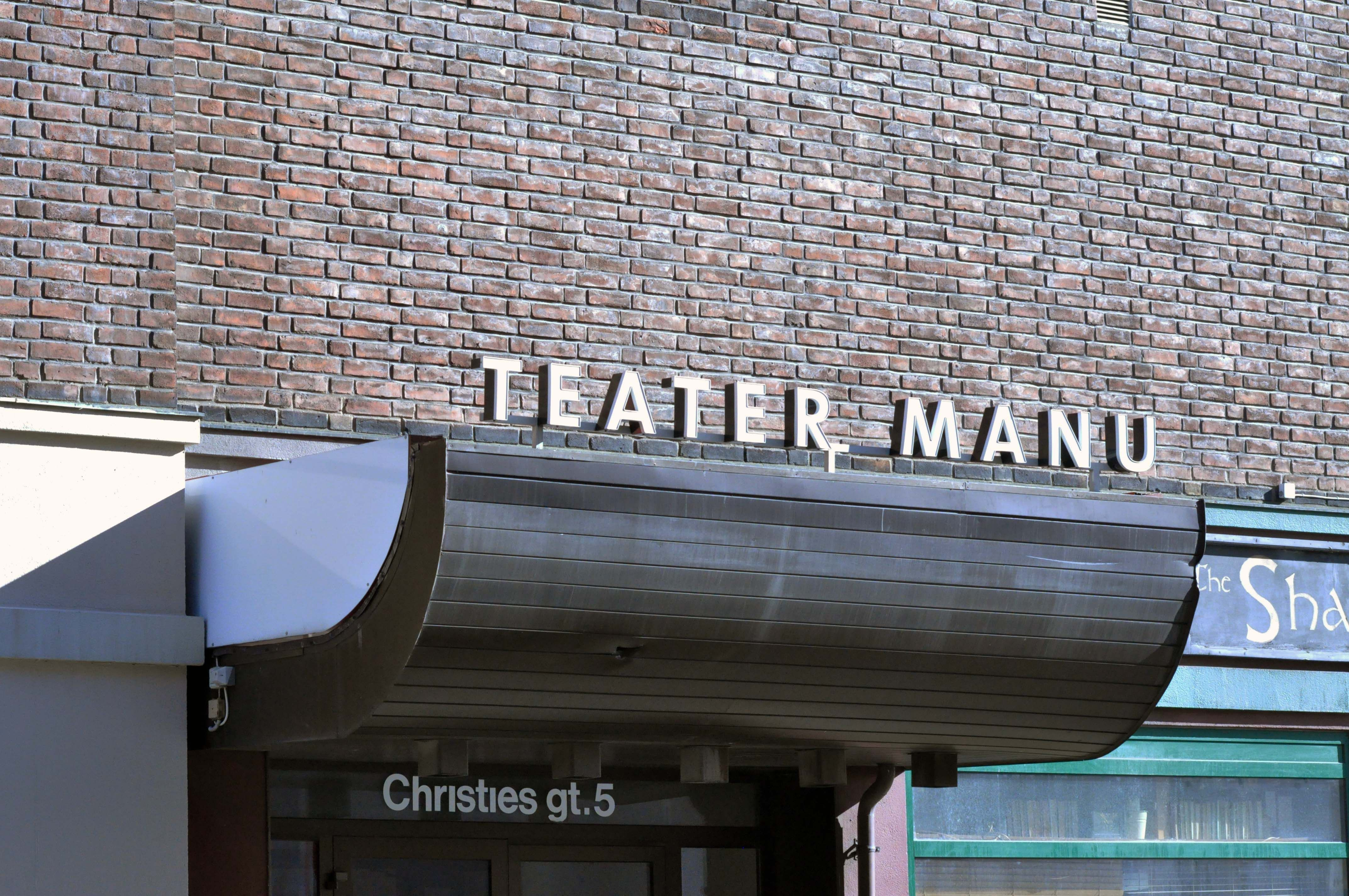 Teater Manus sceneinngang i Christies gate 5 i bygningen Grunerløkkas hus.